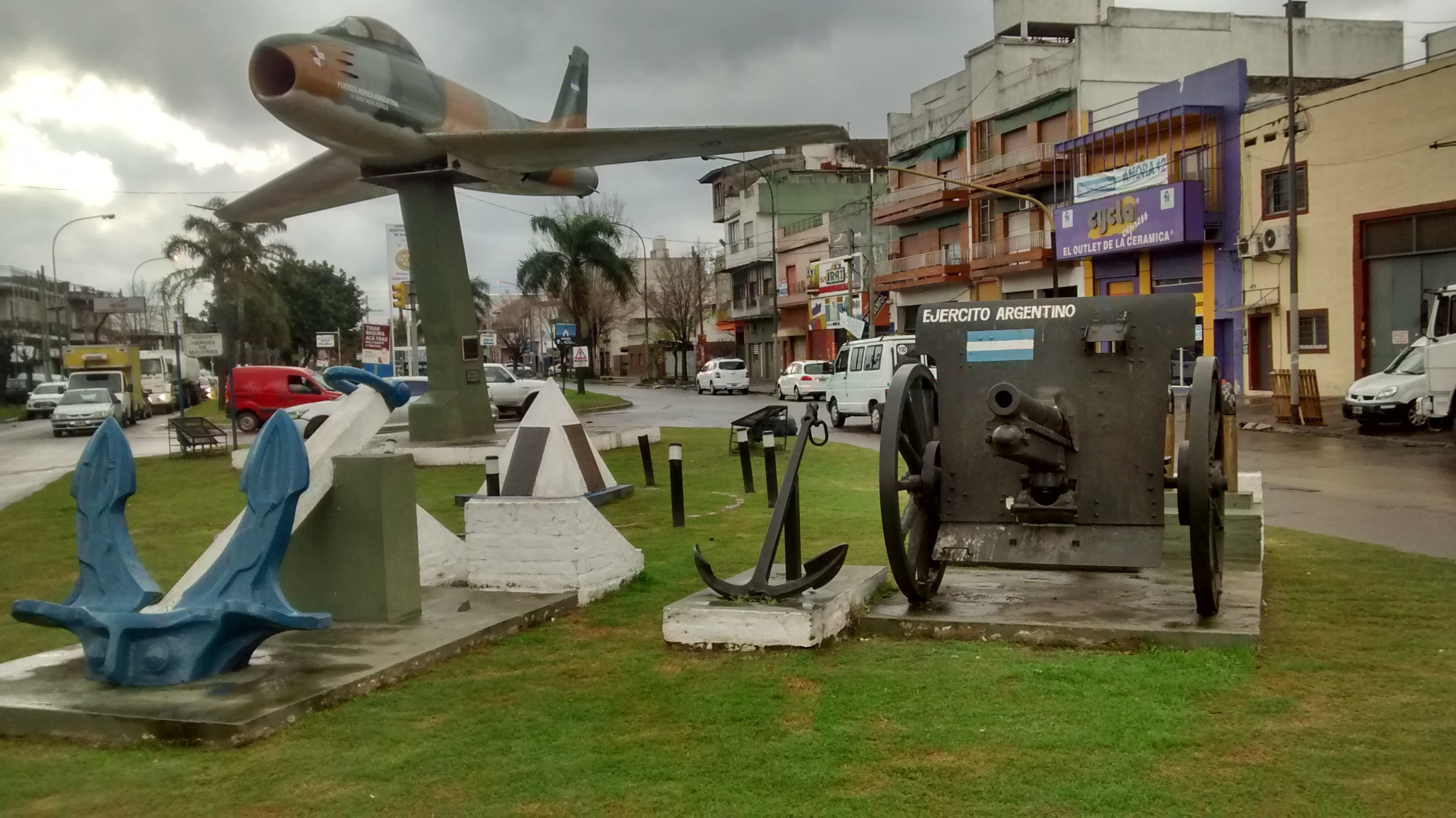 Este monumento está ubicado en la plazoleta "Héroes de Malvinas" ubicada sobre la avenida Remedios de Escalada de San Martín, en la localidad de Lanús, provincia de Buenos Aires. Fue inaugurado por asociaciones de vecinos el 10 de junio de 1984. En el mismo observamos un avión F-86F de la Fuerza Aérea Argentina, un cañón representando al Ejército Argentino y un ancla de buque, donación de la Armada Argentina. El monumento conmemora a los soldados caídos en la Guerra de Malvinas del año 1982 entre Argentina y Gran Bretaña.Plazoleta Héroes de Malvinas en Lanús